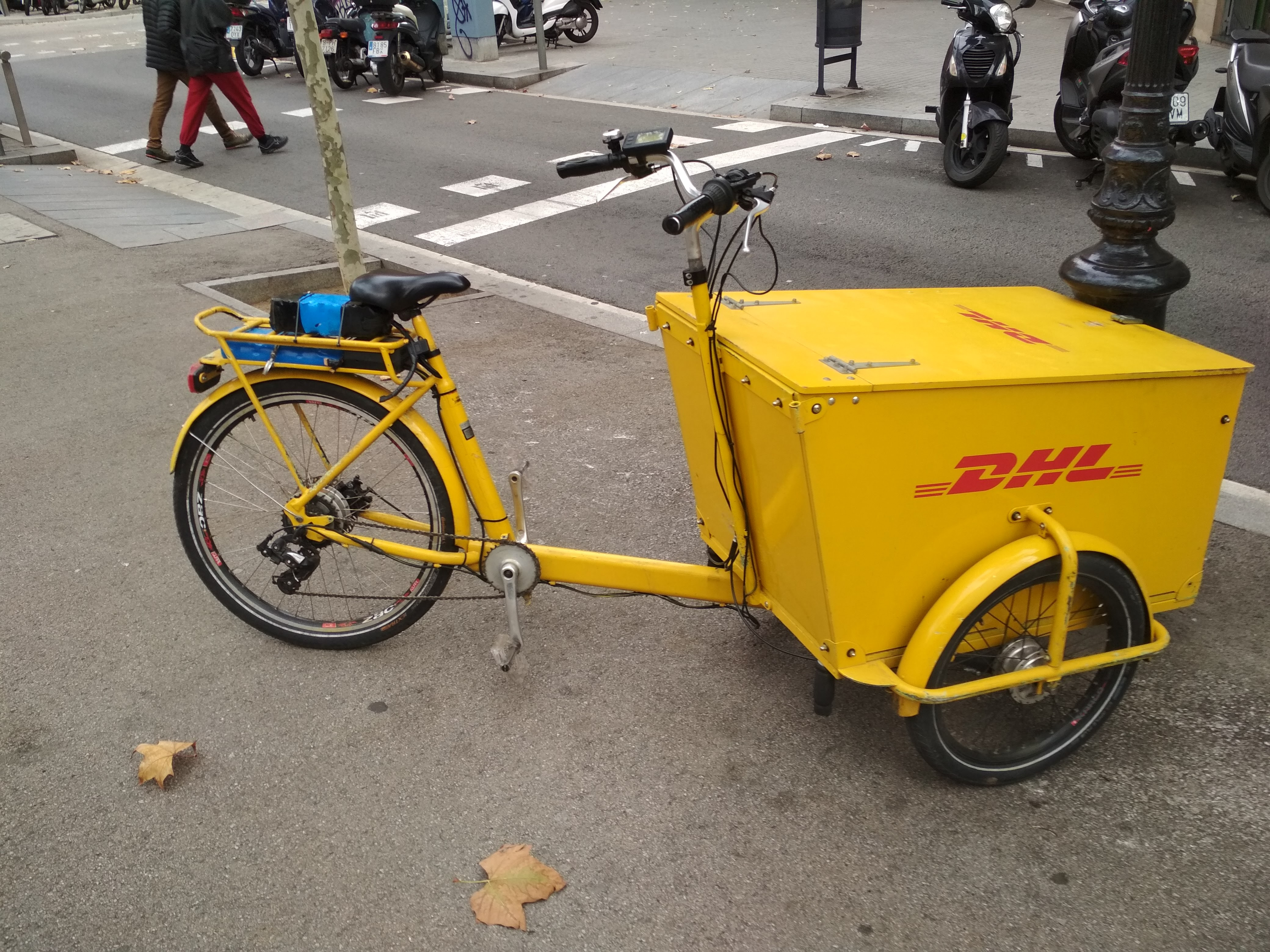 Nákladní elektrokolo firmy DHL s s krytým nákladním prostorem vepředu ve žluté barvě stojící na chodníku u silnice, před kterou po přehodu přecházejí lidé. Na boku nákladního boxu je logo DHL. Podzm 2019, Barcelona.